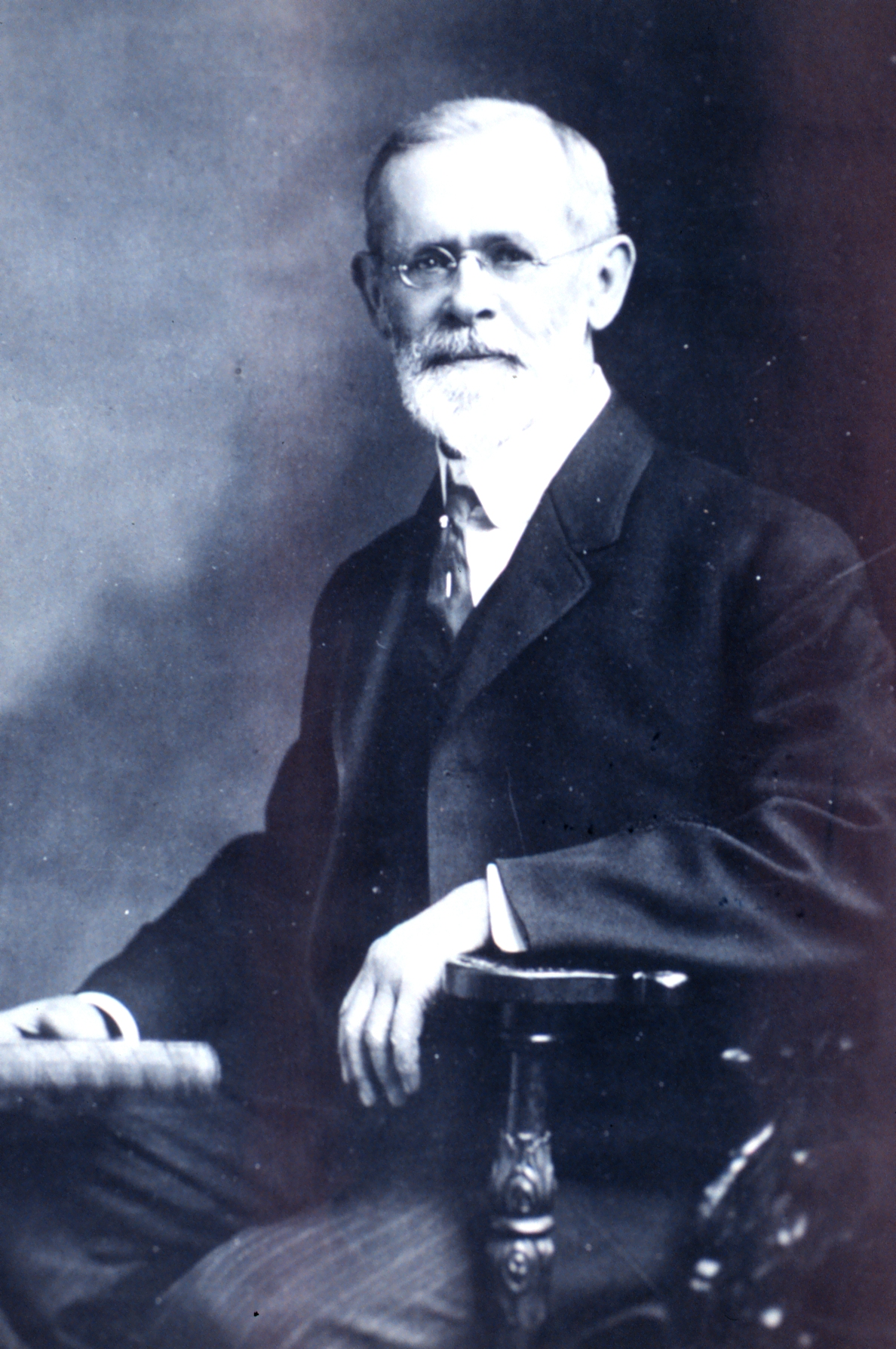 Credit: National Oceanic and Atmospheric Administration/Department of Commerce [1] Cleveland Abbe (dead link; moved to Bild:Cleveland Abbe.jpg Image:Cleveland Abbe pers0074.jpg Bilde:Cleveland Abbe pers0074.jpg